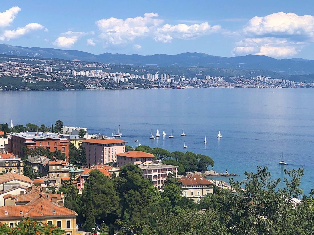 Opatija